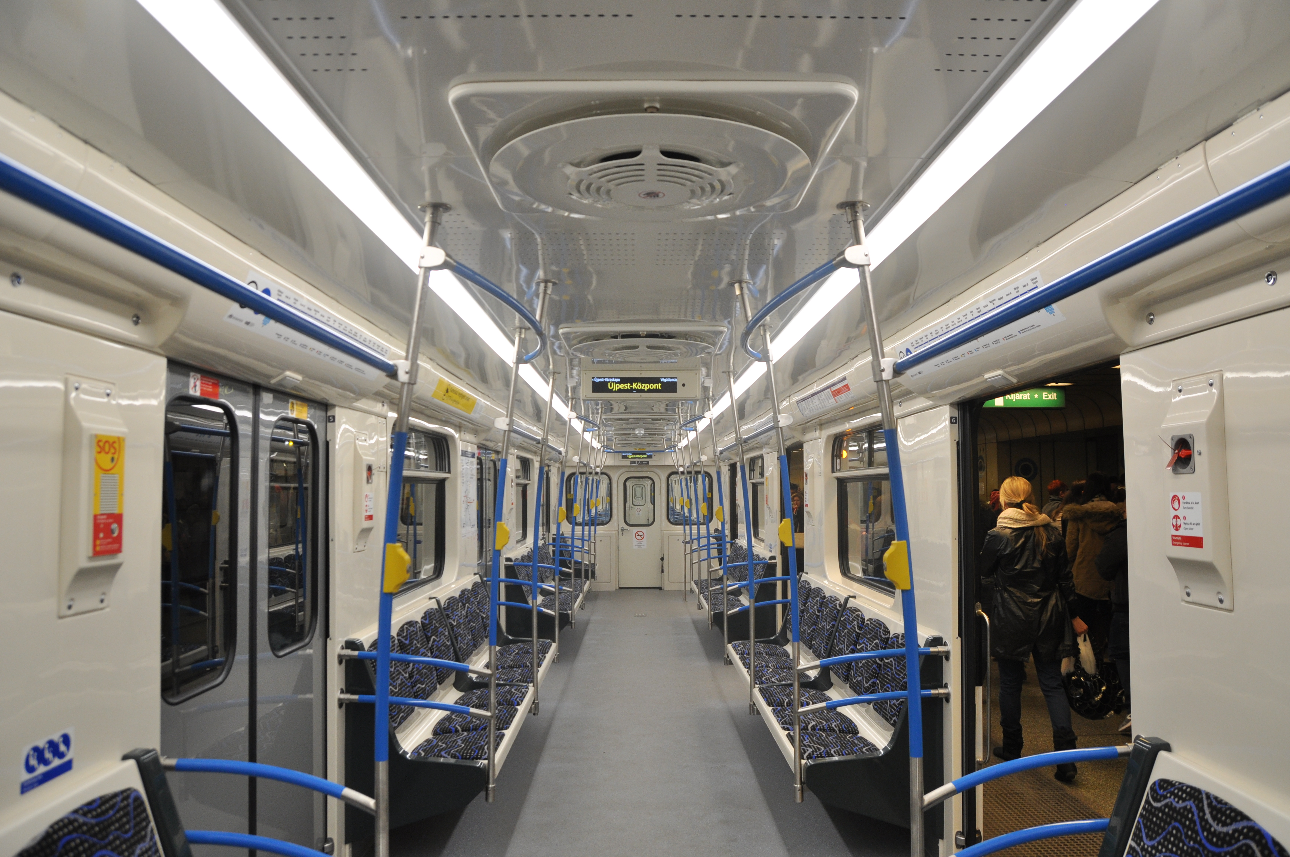 Budapest, metró 3, Újpest-Központ